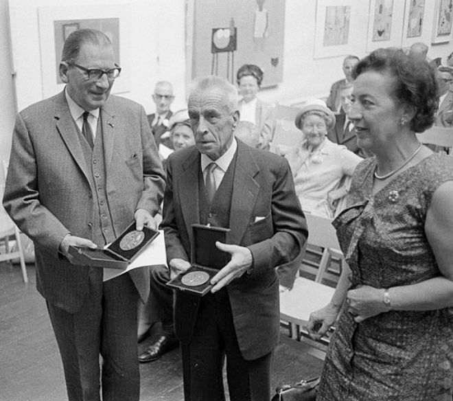 Uitreiking in het gebouw van de Rotterdamsche Kunstkring van de Anna Blamanprijs voor literatuur aan de schrijver-journalist W. A. Wagener (met bril) en de Hendrik Chabotprijs voor beeldende kunst aan de beeldhouwer Piet van Stuivenberg door het Anjerfonds Rotterdam. Mevrouw C. Lührs-Vrugt (rechts), de zus van Anna Blaman, reikte de prijzen uit.